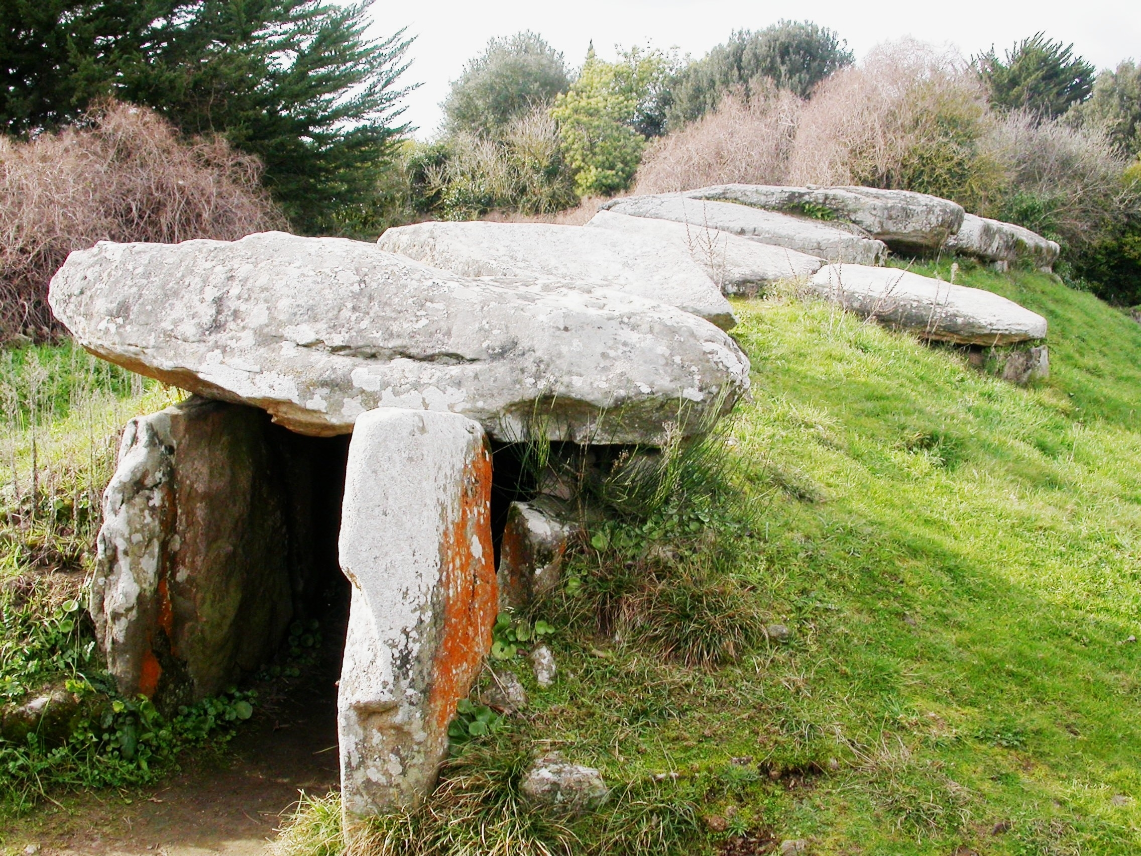 Dolmen du Mané Retual